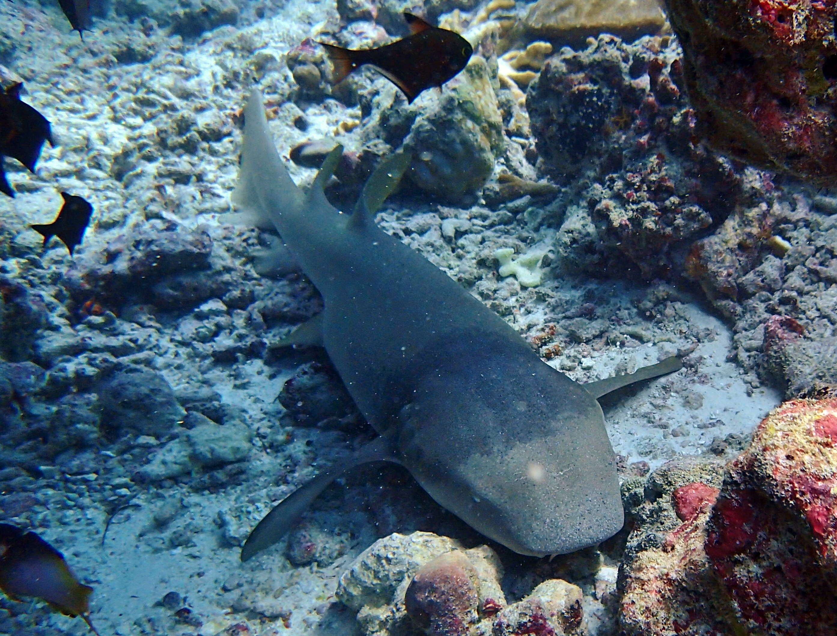 Un requin nourrice (Nebrius ferrugineus) aux Maldives (atoll de Baa).